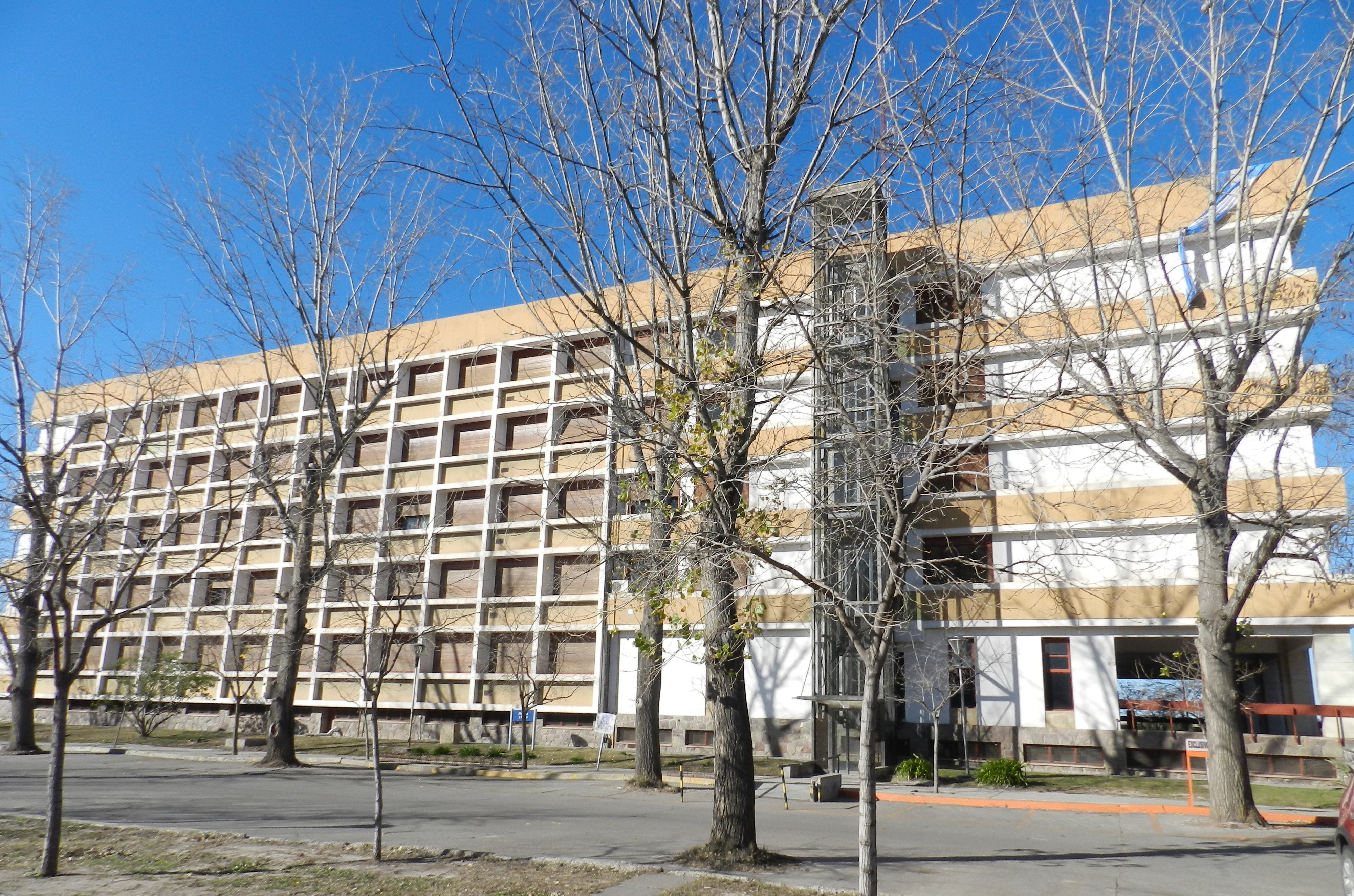 Filosofía y Letras UNCuyo